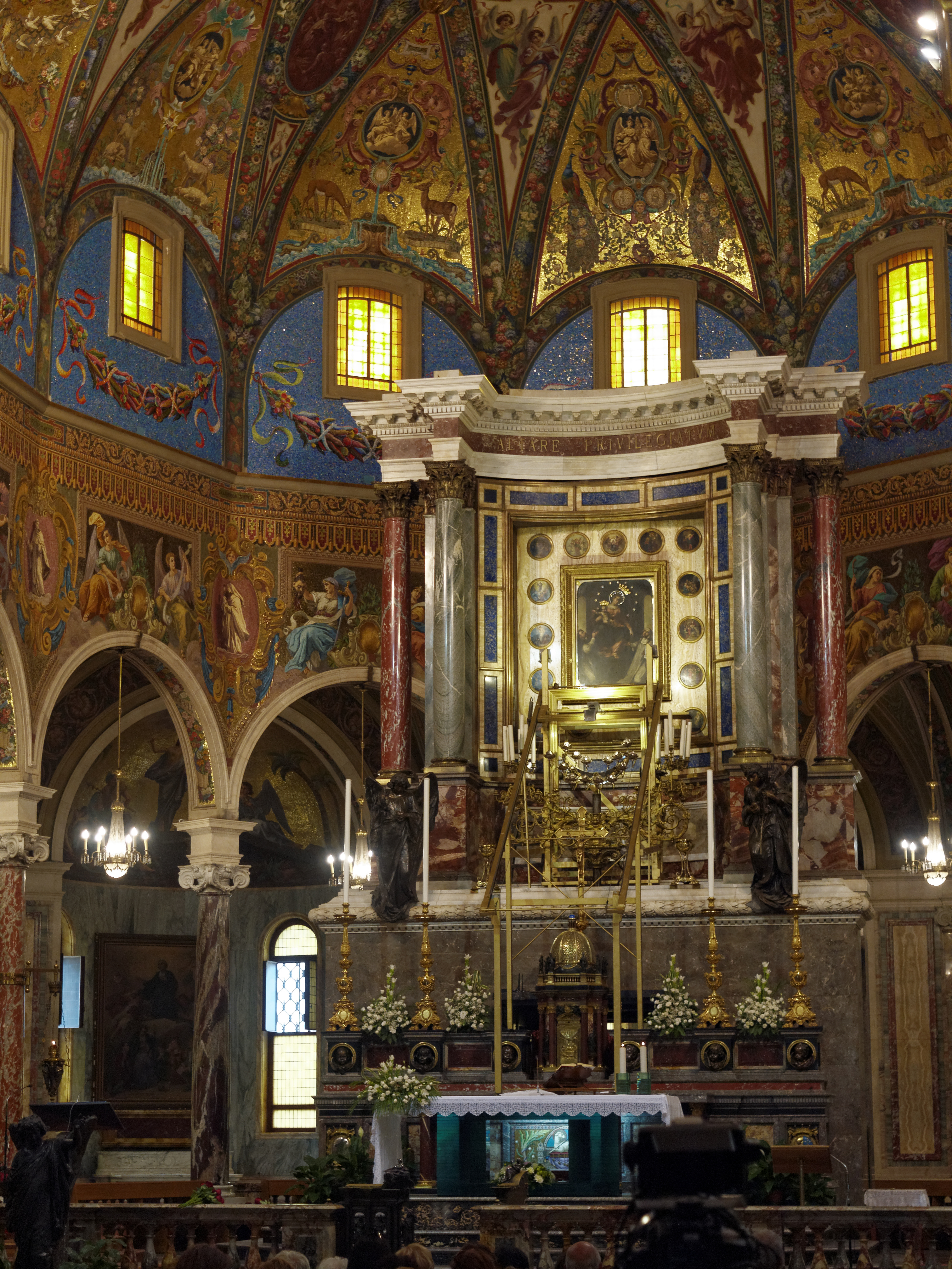 Der Altar mit Chorraum der Kirche Beata Vergine del Santo Rosario di Pompei in Pompei, Kampanien, Italien